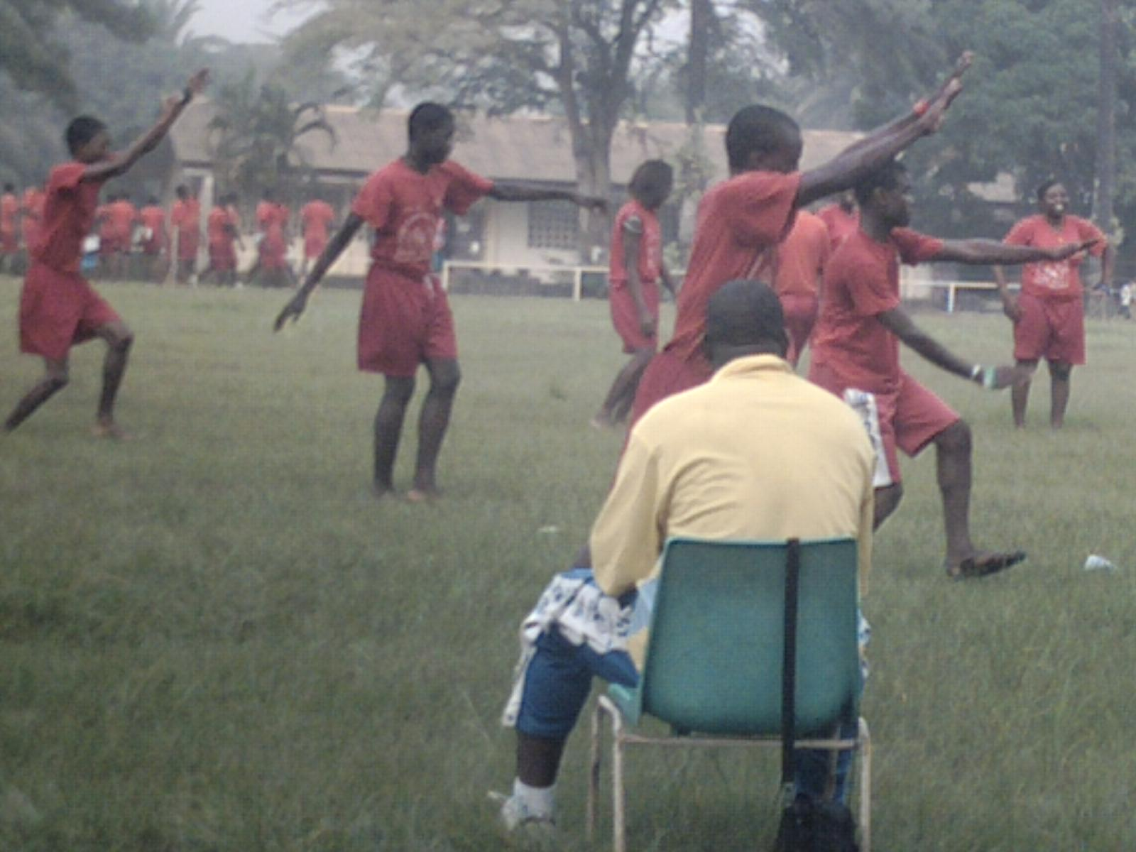 Le Lycée d'Abidjan possède deux grands terrains de football.